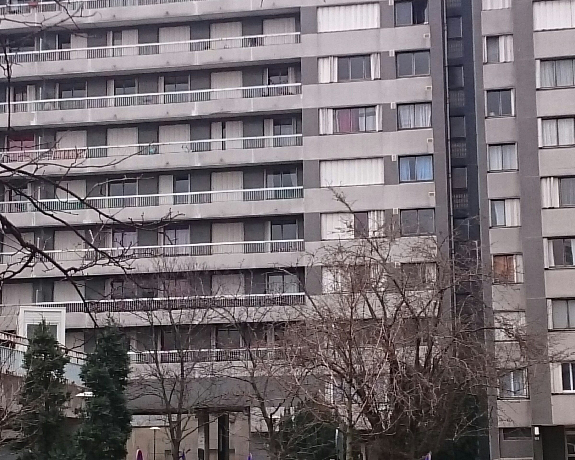 la partie locataire de l'allée d'andrézieux